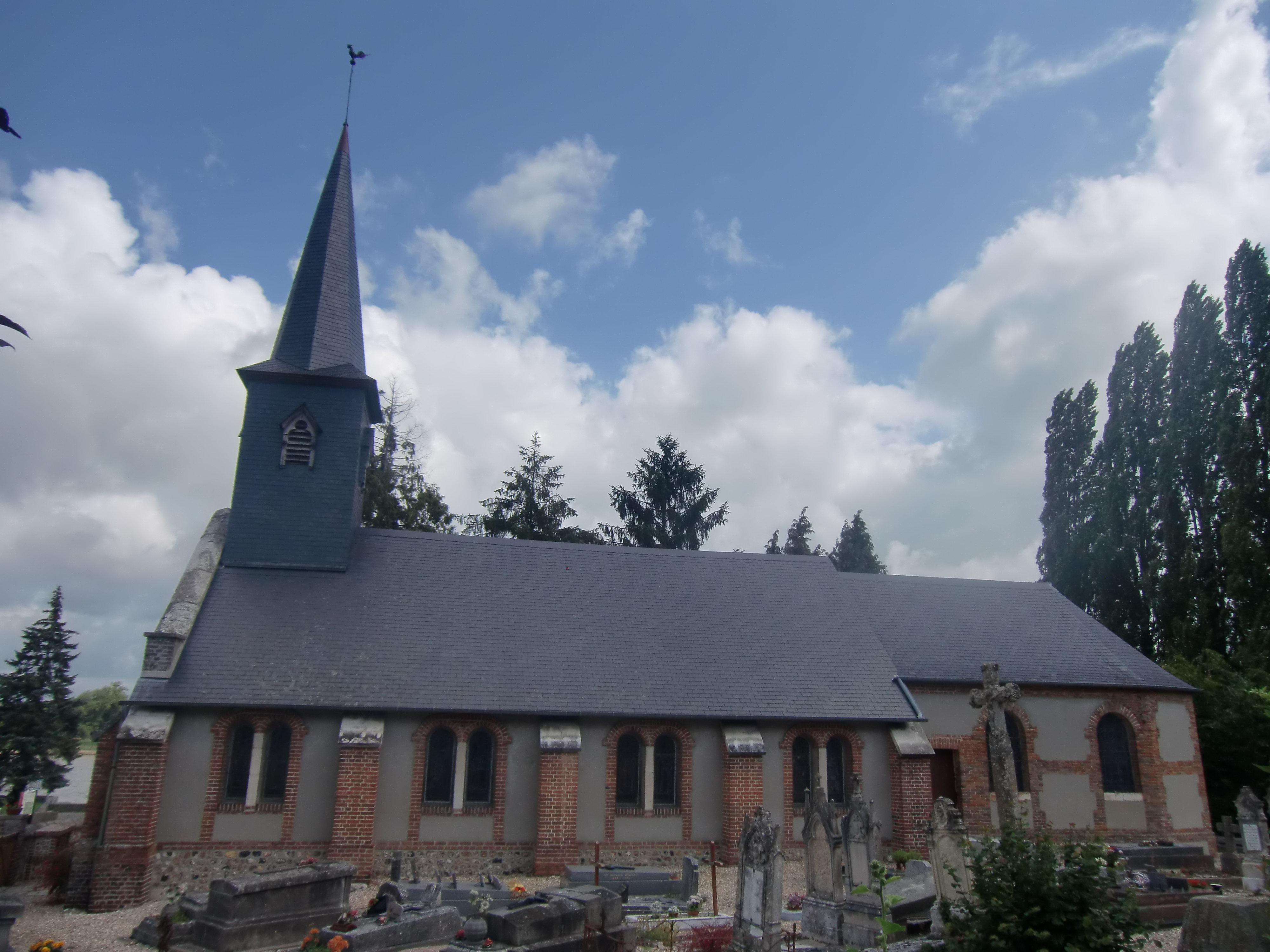 Église Saint-Michel de Vieux-Port (Eure, Normandie, France)